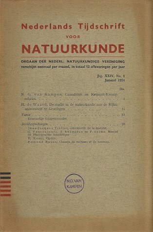 Nederlands Tijdschrift voor Natuurkunde, jaargang XXIV, nr 1, Januari 1958. N.G. van Kampen: Causaliteit van Kramers-Kronig-relaties H. de Waard: De studie in de natuurkunde aan de Rijksuniversiteit Groningen.